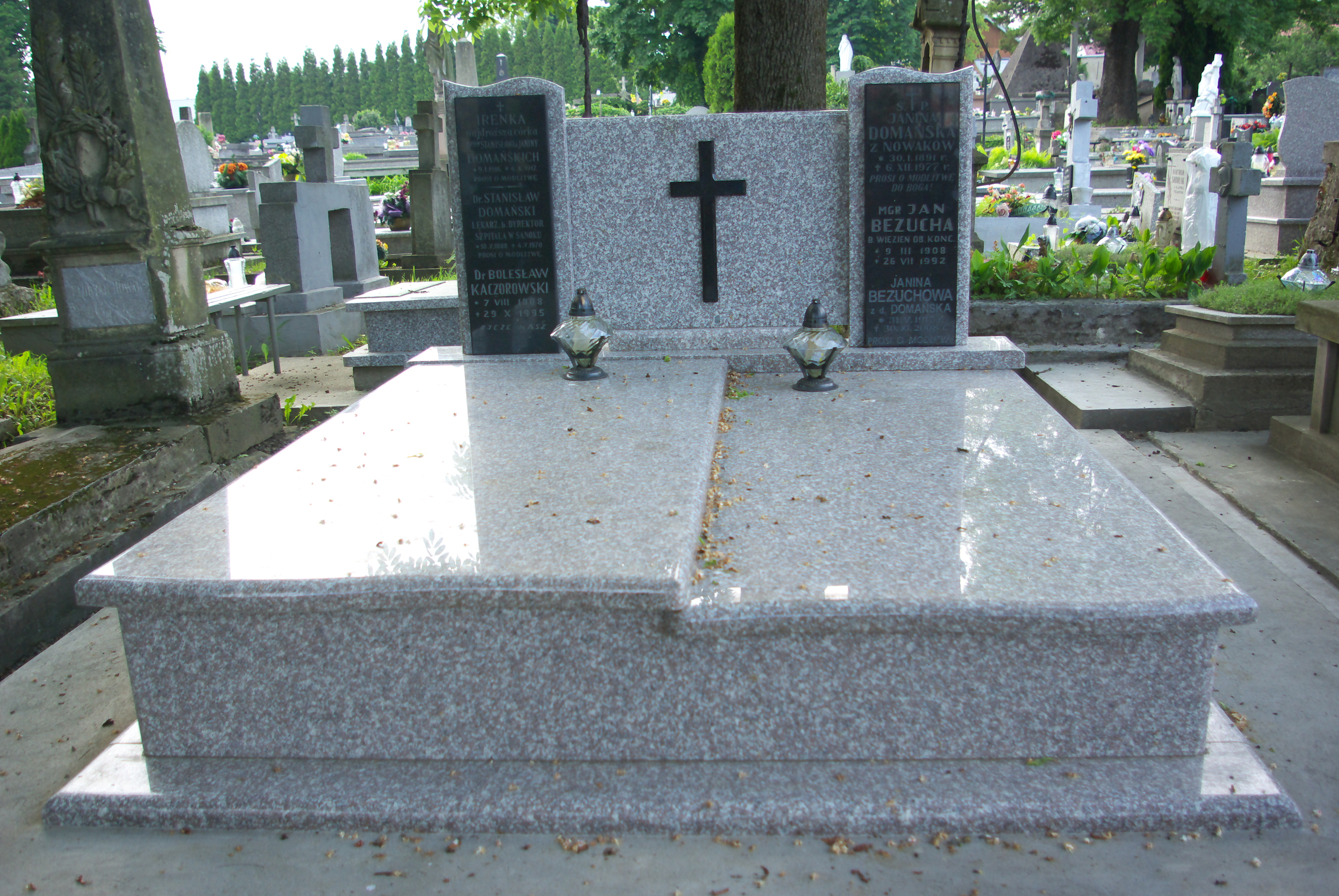 Grobowiec rodzin Domańskich i Bezuchów na Cmentarzu Centralnym w Sanoku. Nowy nagrobek ustanowiony w 2015.